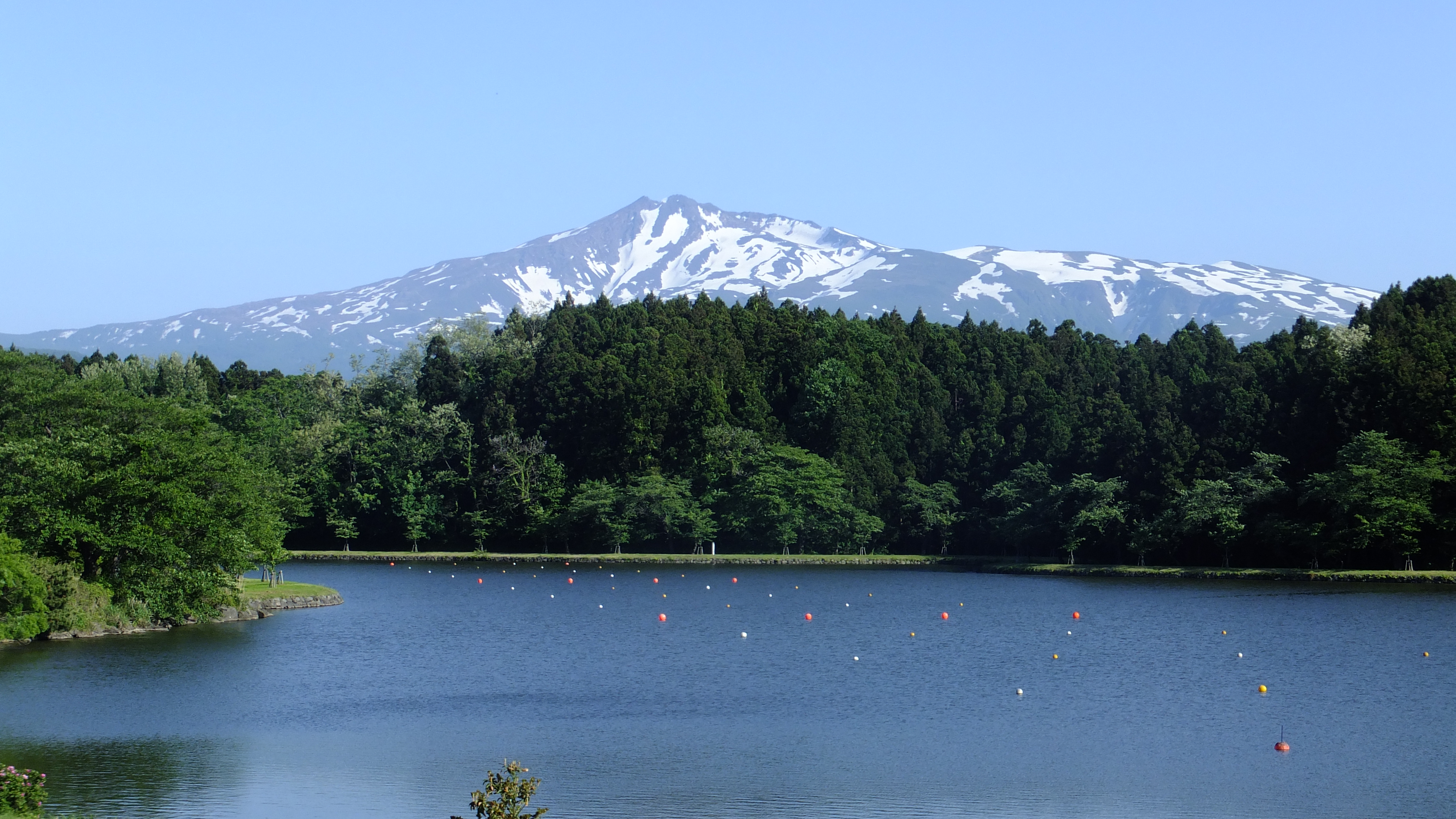 白瀬南極探検隊記念館前より、竹島潟と鳥海山を望む。